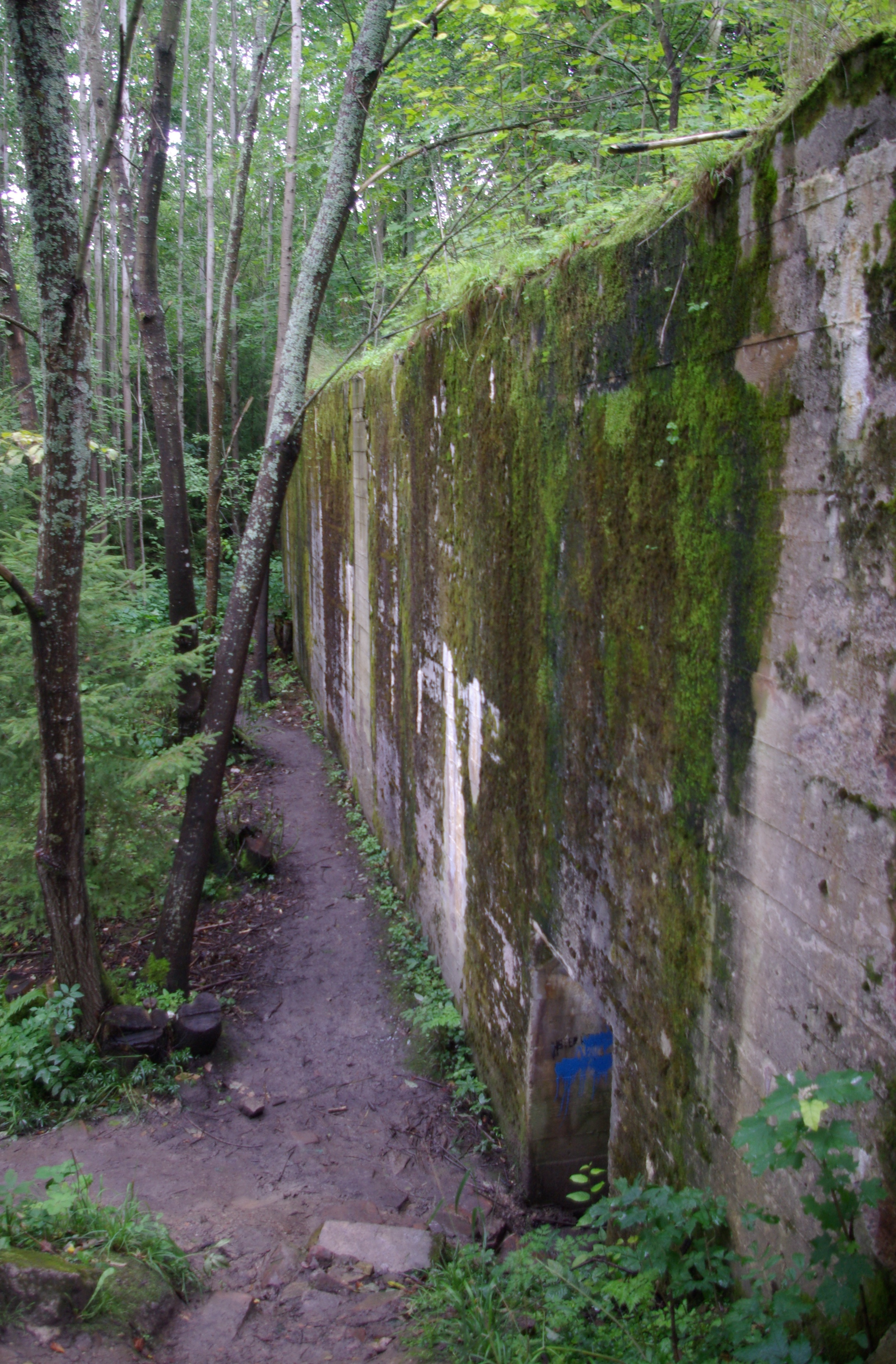 Kwatera Naczelnego Dowództwa Wojsk Lądowych (OKH) w Mamerkach